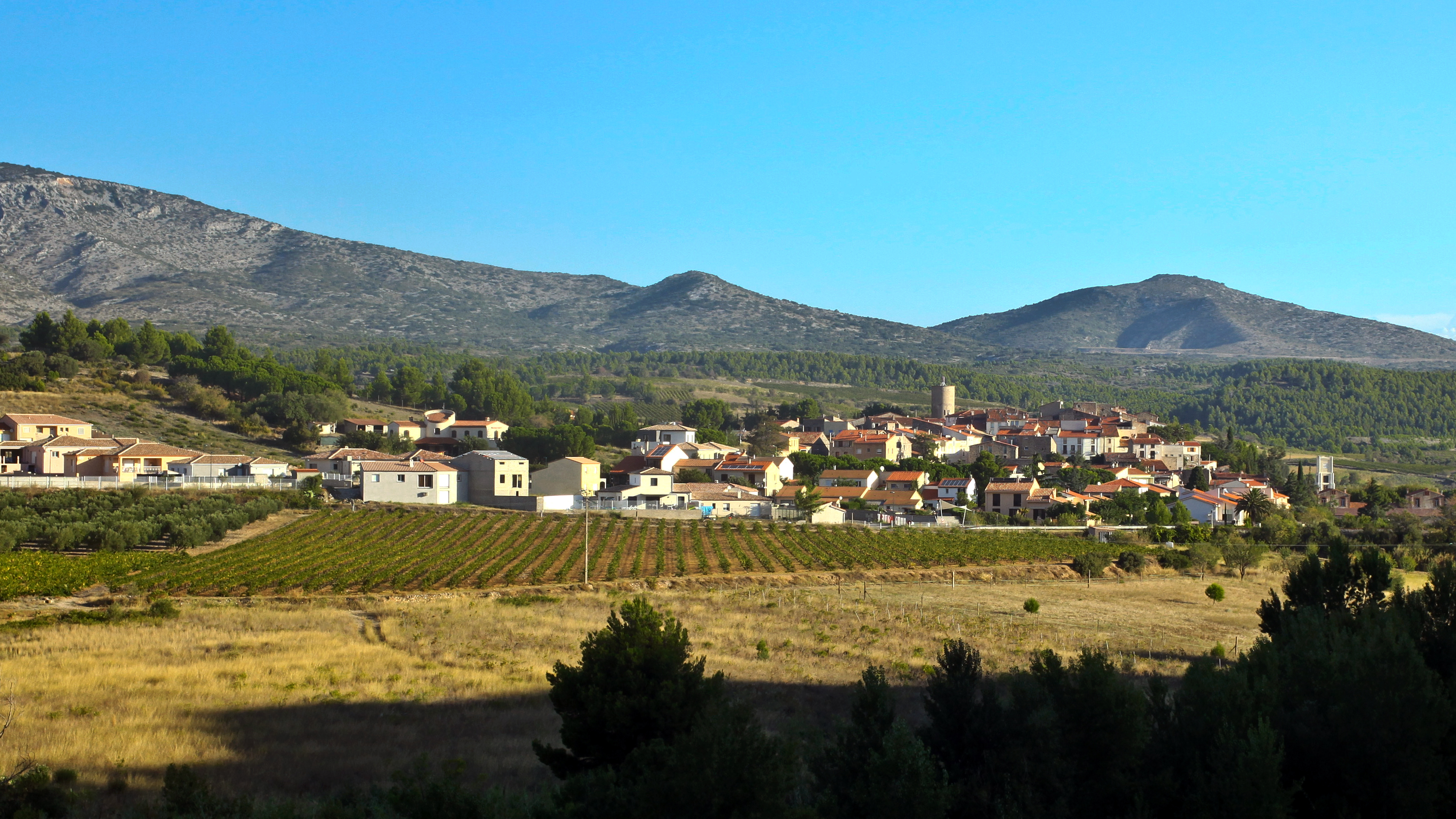 Le village de Cases-de-Pène